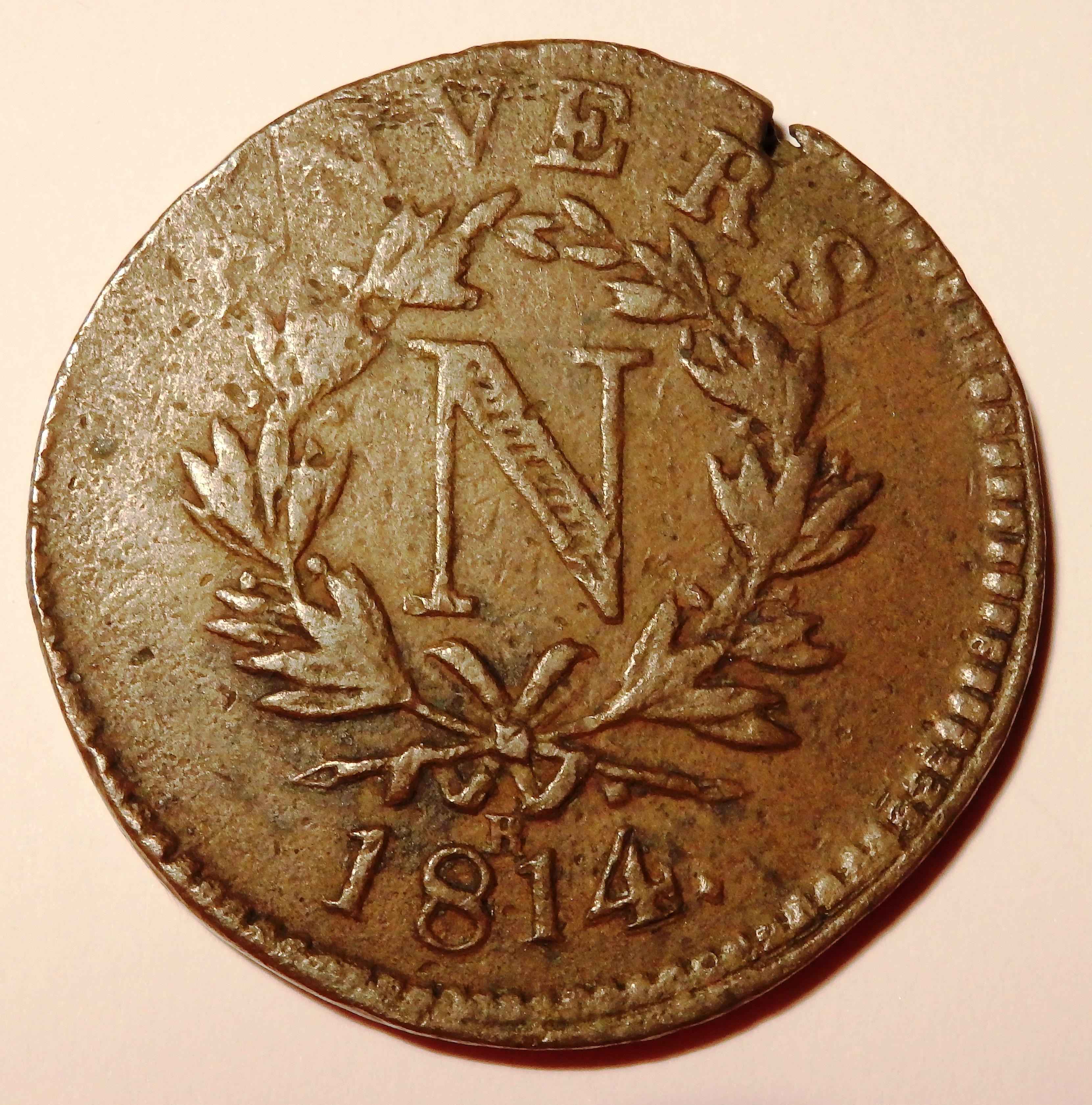 Belagerungsmünze des Jahres 1814 aus Antwerpen über 10 Centimes, Schön/Cartier Nr 2